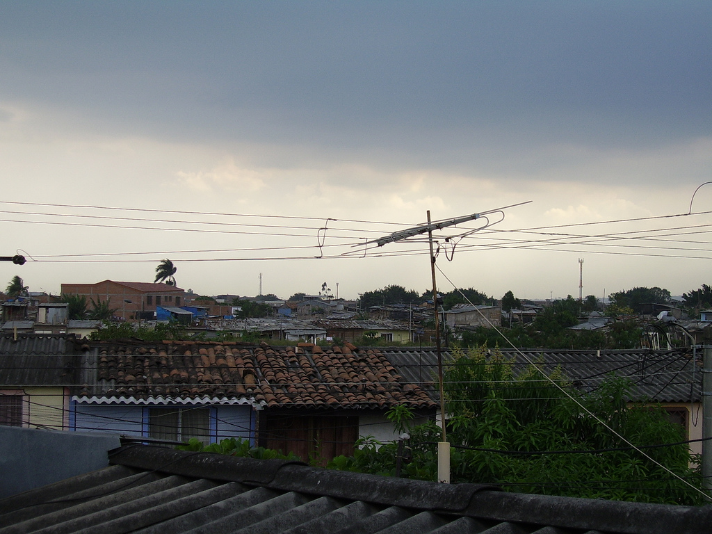 Vista del Distrito desde El Laguito